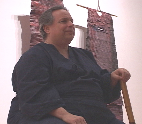 Ronnie Nyogetsu Reishin Seldin